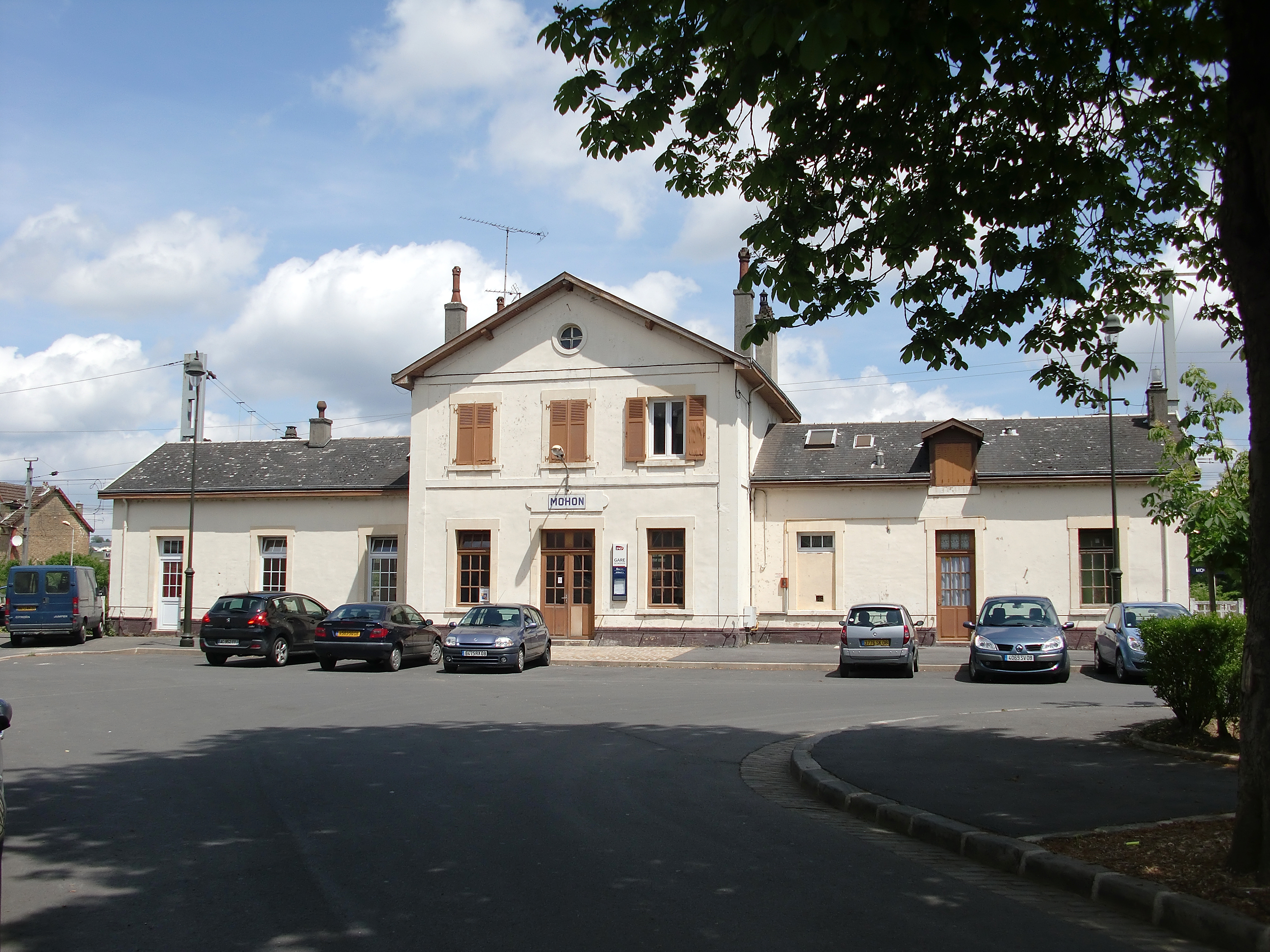 La gare de Mohon